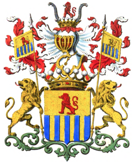 Armoiries de la famille d'Anethan